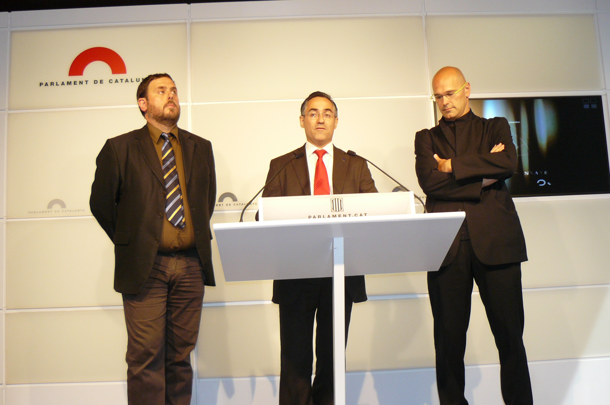 Ramon Tremosa a la sala de premsa del Parlament.